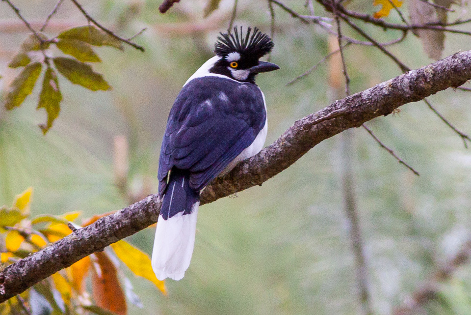 Durango Highway,Sinaloa